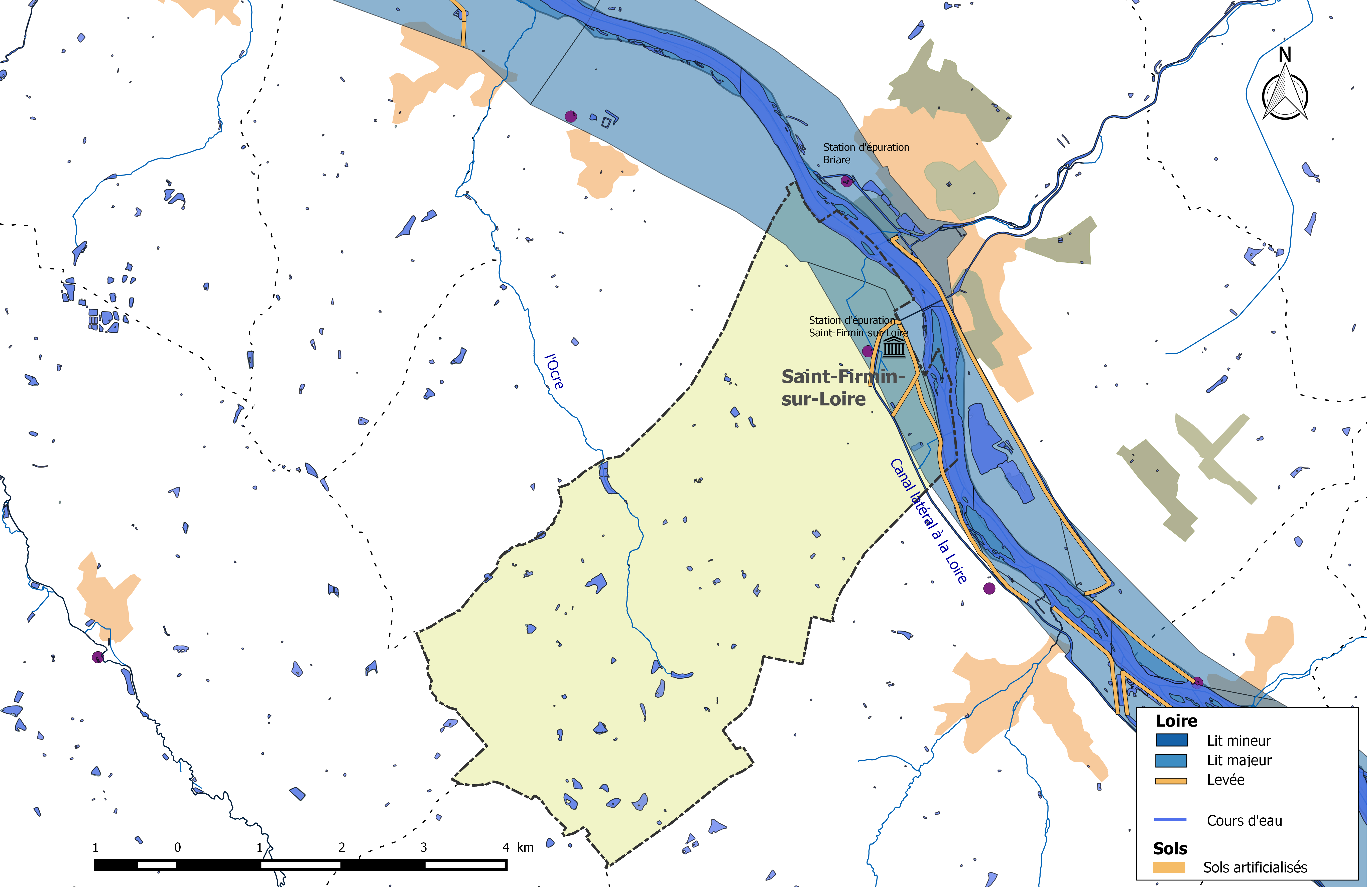 Zone inondable et réseaux hydrographique et routier de la commune de Saint-Firmin-sur-Loire